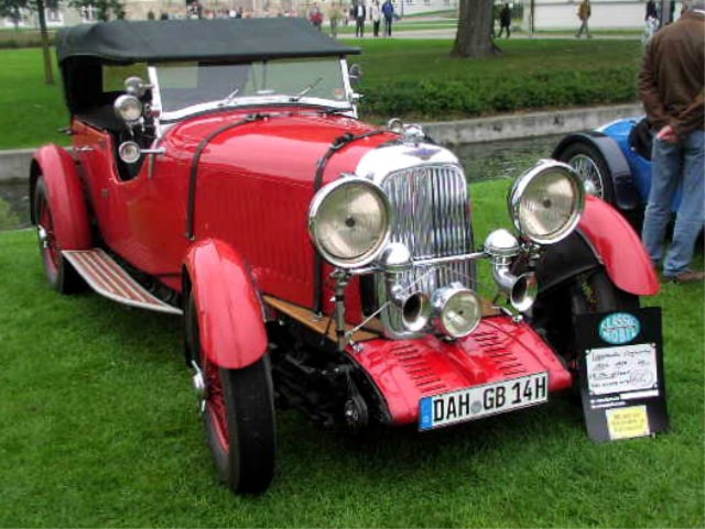 Lagonda (1926)